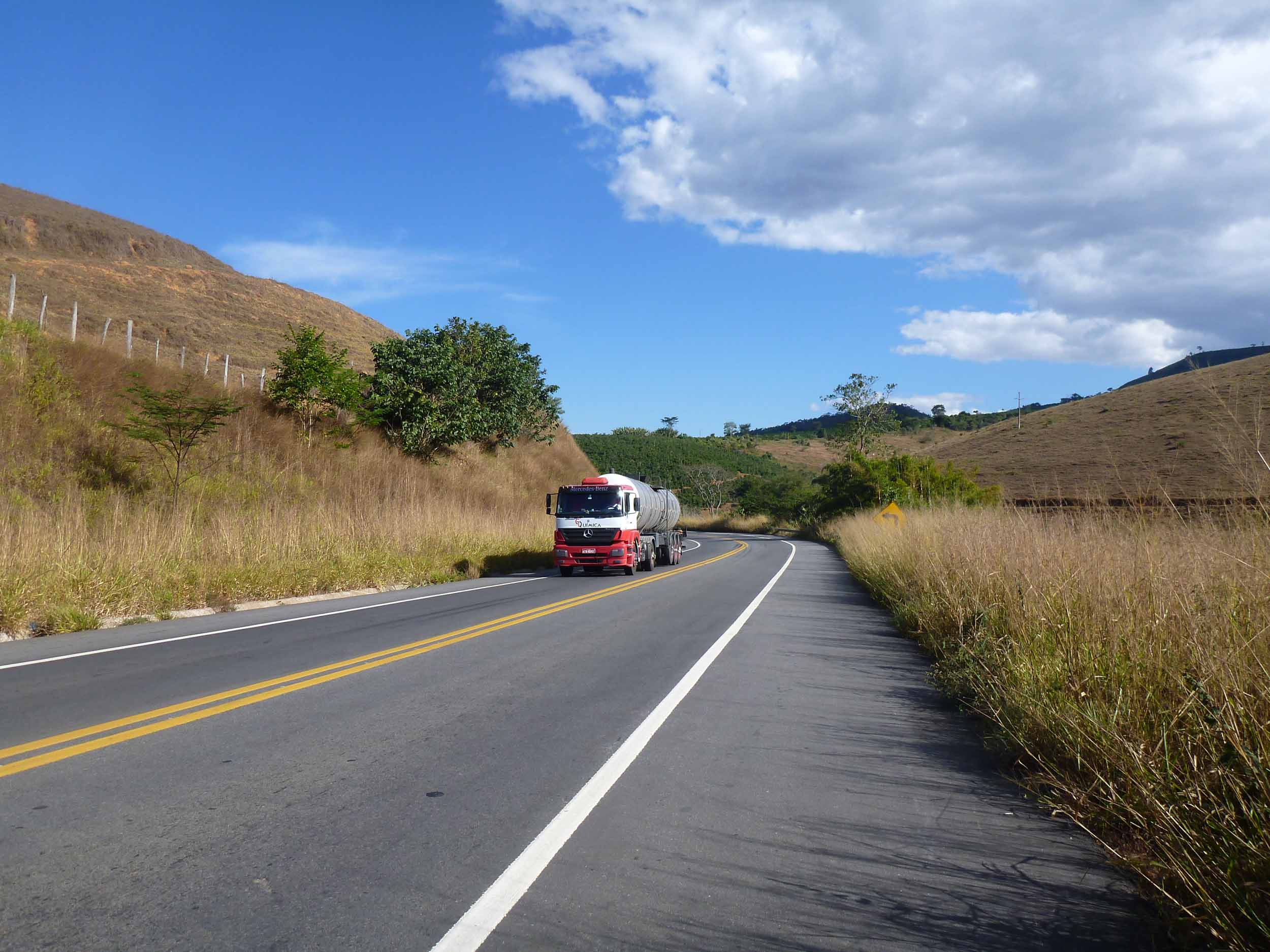 Pesquisa CNT de Rodovias 2012 - Foto: Arquivo/CNT